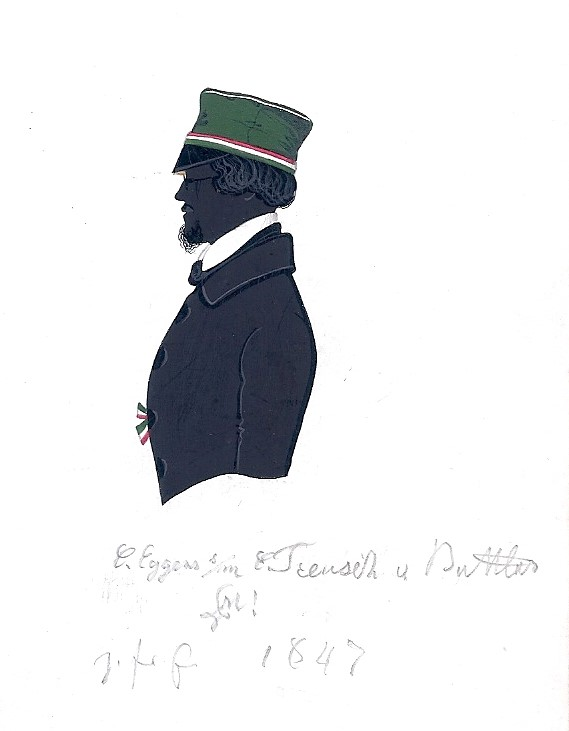 Schattenriss des späteren Schriftstellers Karl Eggers